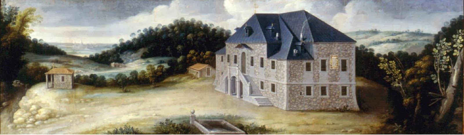 Vista de la Casa de la Fuenfría o de Eraso (Siglo XVII)